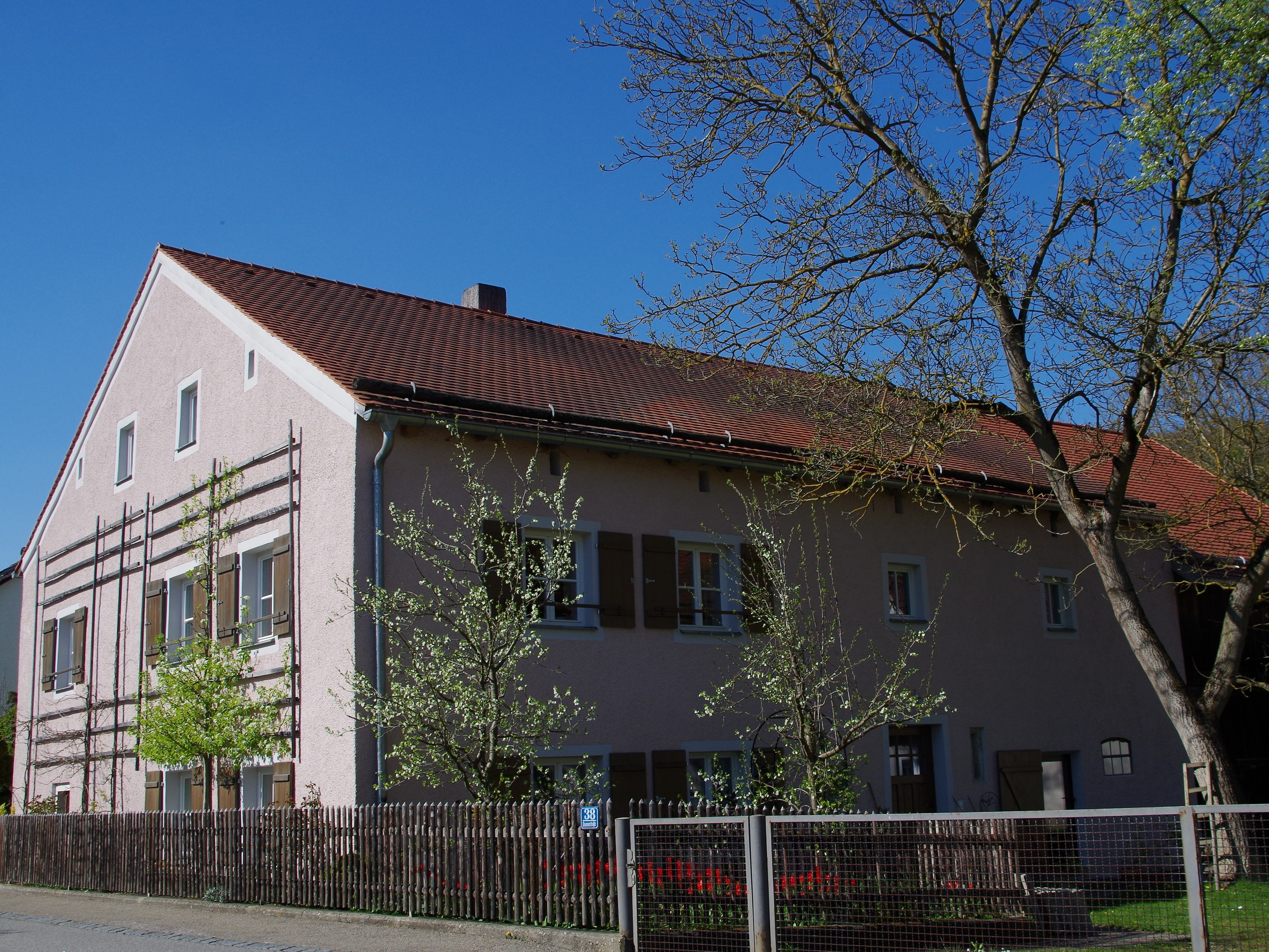 Ehem. Wohnstallhaus - Oberndorf